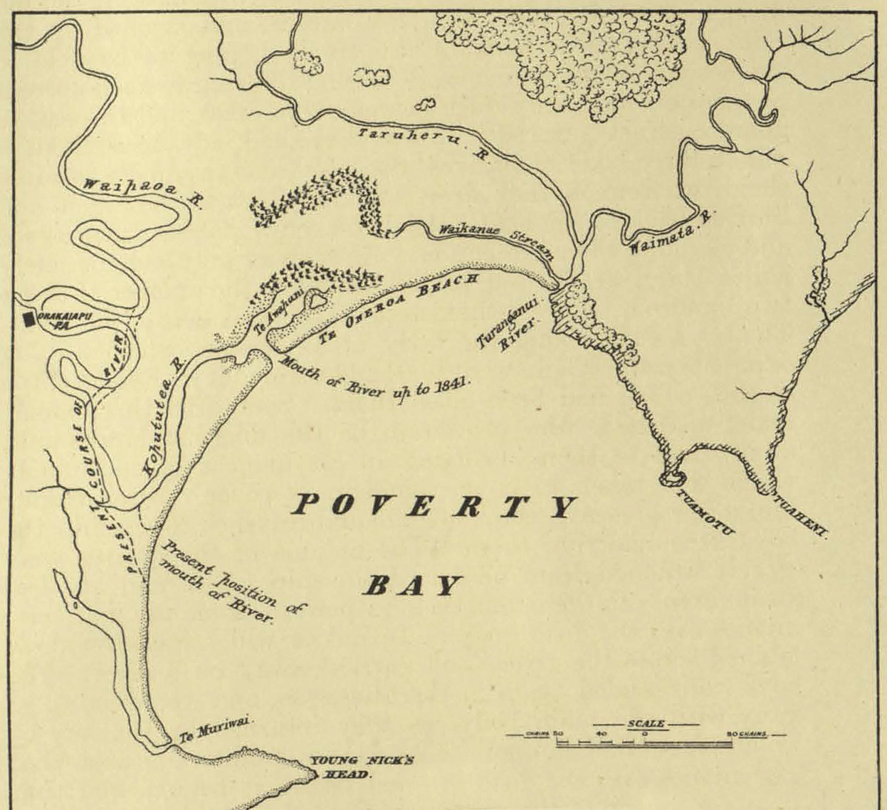 Poverty Bay, Nueva Zelanda, tal como era en octubre de 1769 a la llegada de James Cook a bordo del HMB Endeavour. Versión de W.L. Williams de 1888.